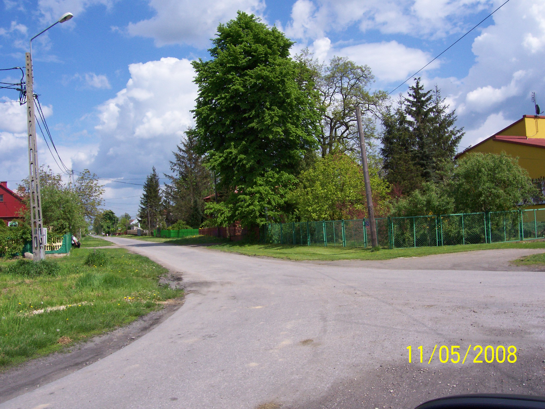 Józefów w gminie Lipsko